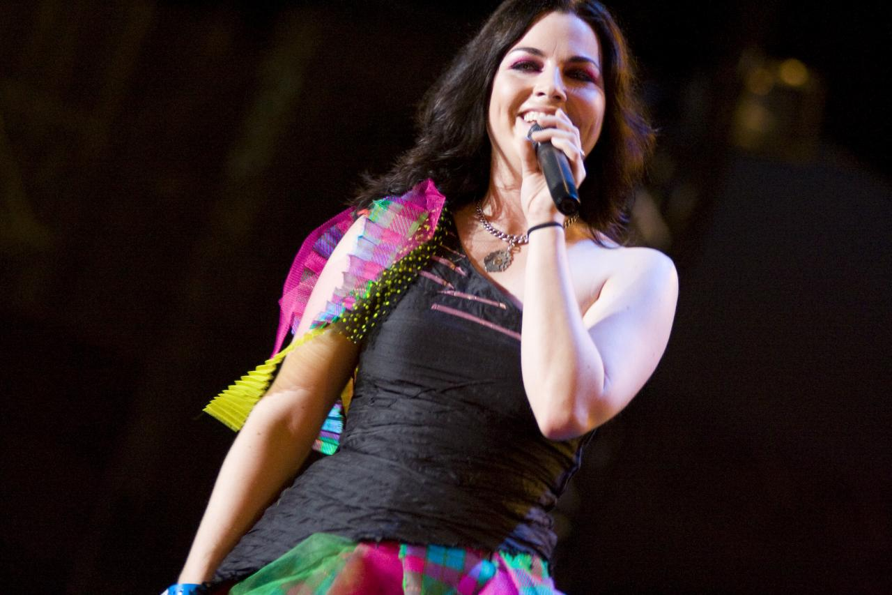 Evanescence @ Maquinaria Festival - 08/11/2009 - São Paulo, Brasil É proibida a cópia ou reprodução deste material sem a autorização do autor. Por favor, não publique nada daqui sem o devido crédito. Fotógrafo: Alexandre Cardoso